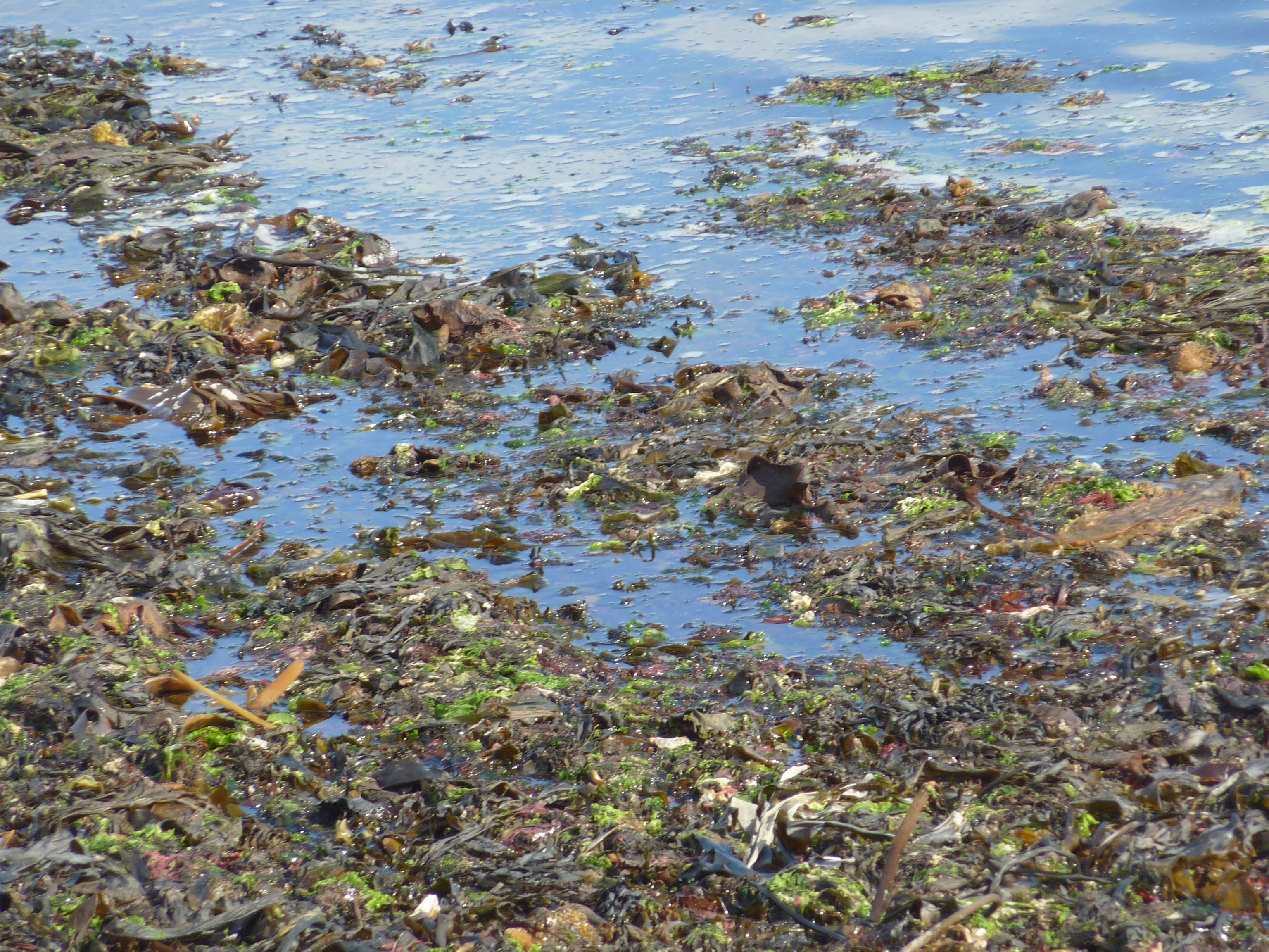 Pointe de Mousterlin en Fouesnant : goémon